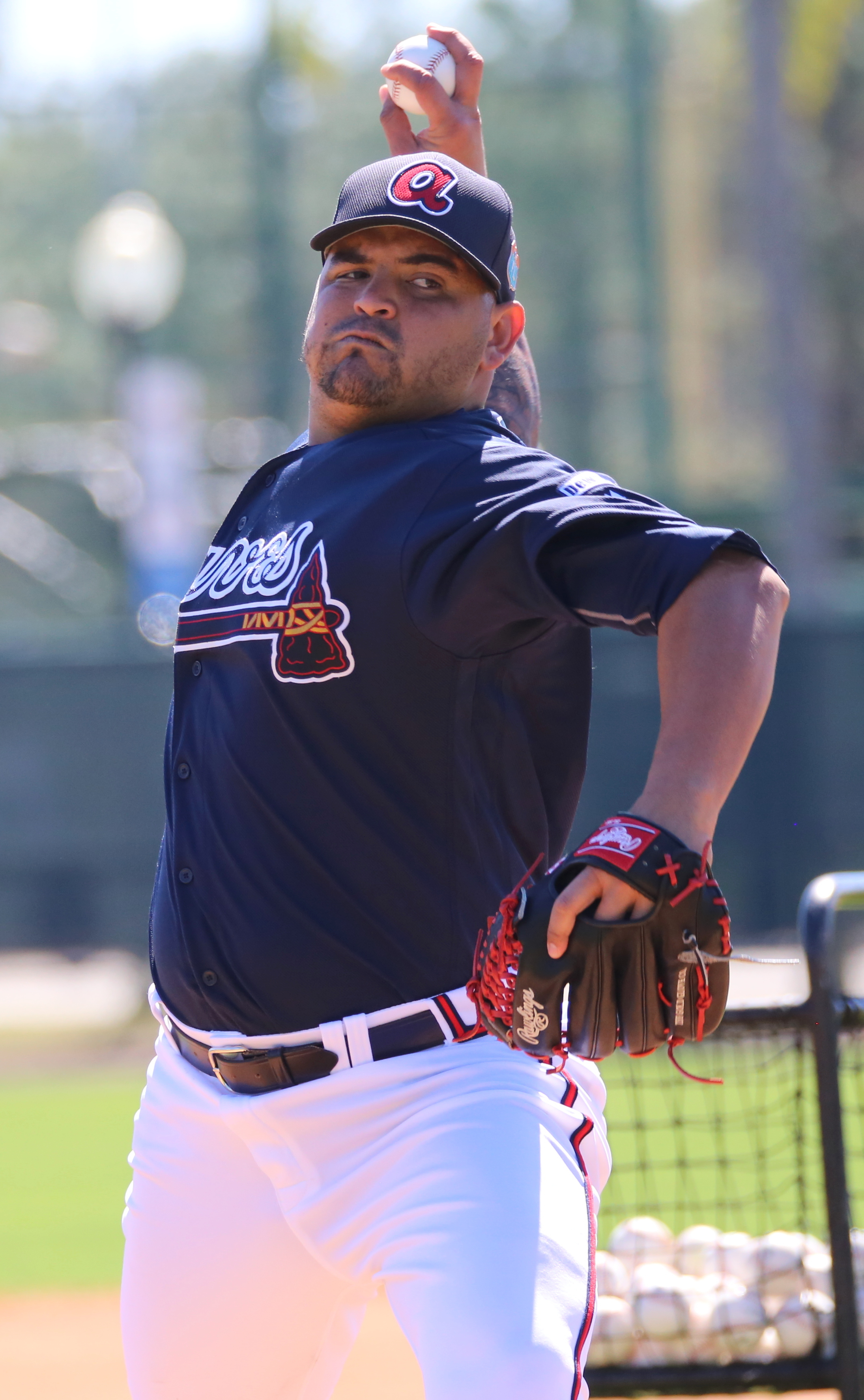 Williams Pérez